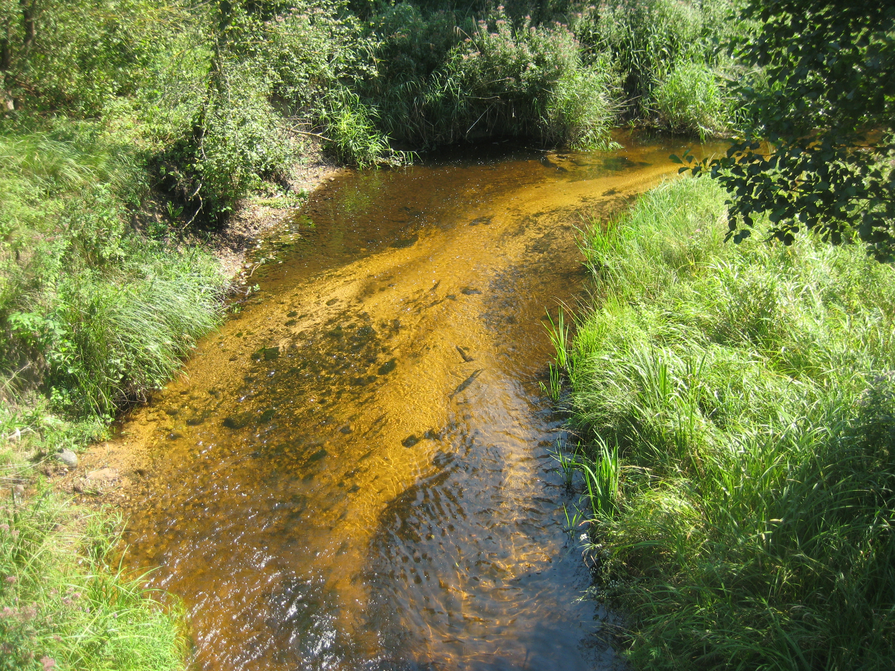 Štadviliai, Lithuania